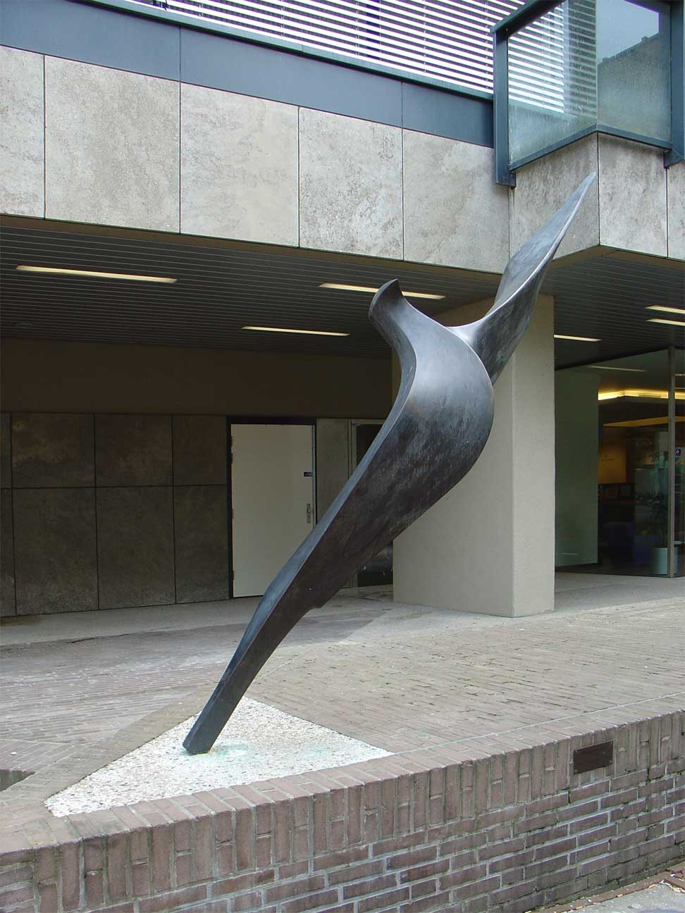 Vogelvlucht (brons, 2000) door Jef Wishaupt - Bouwmeesterplein/Stationsplein Gouda